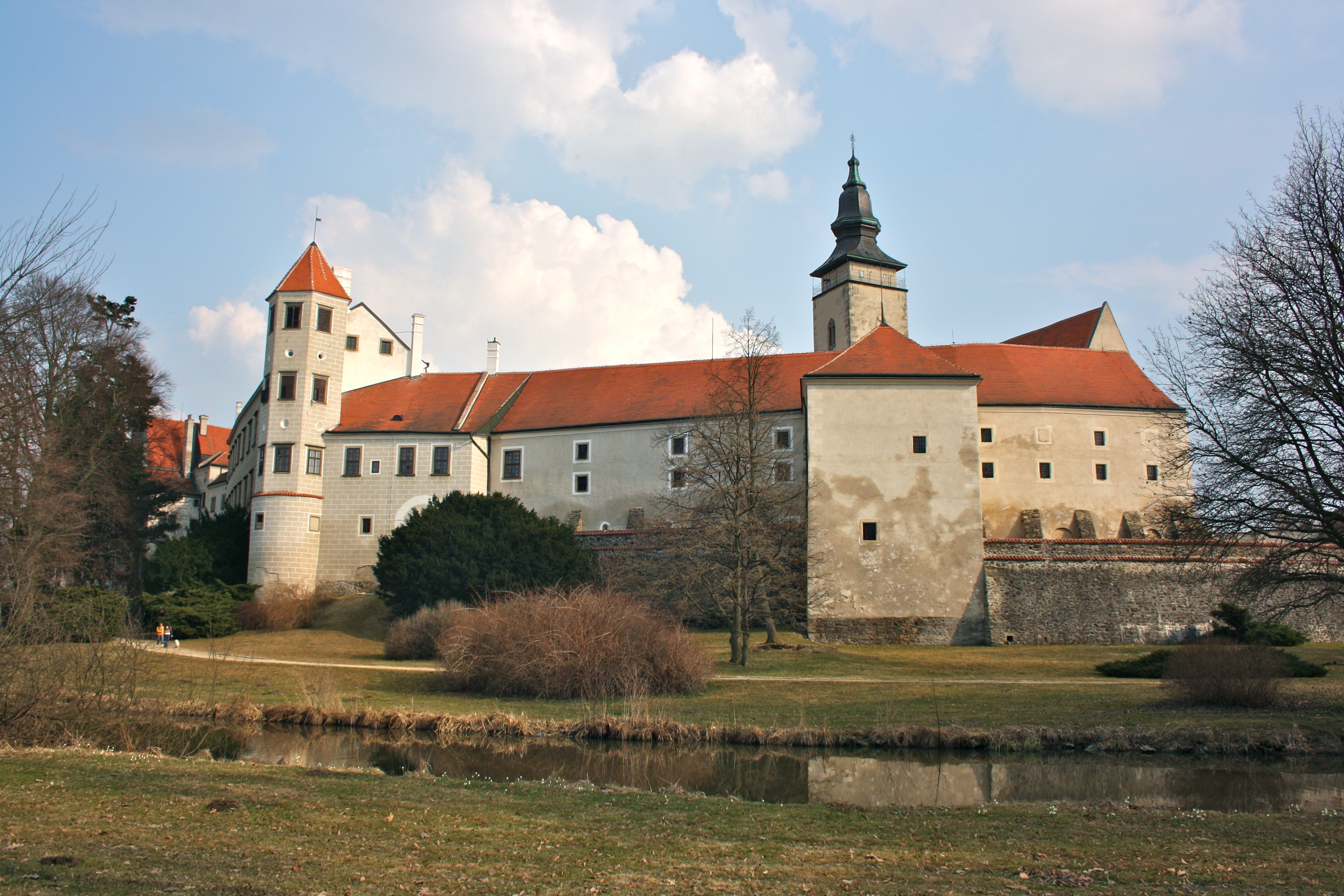 Zámek Telč, nám. Zachariáše z Hradce 1, Telč